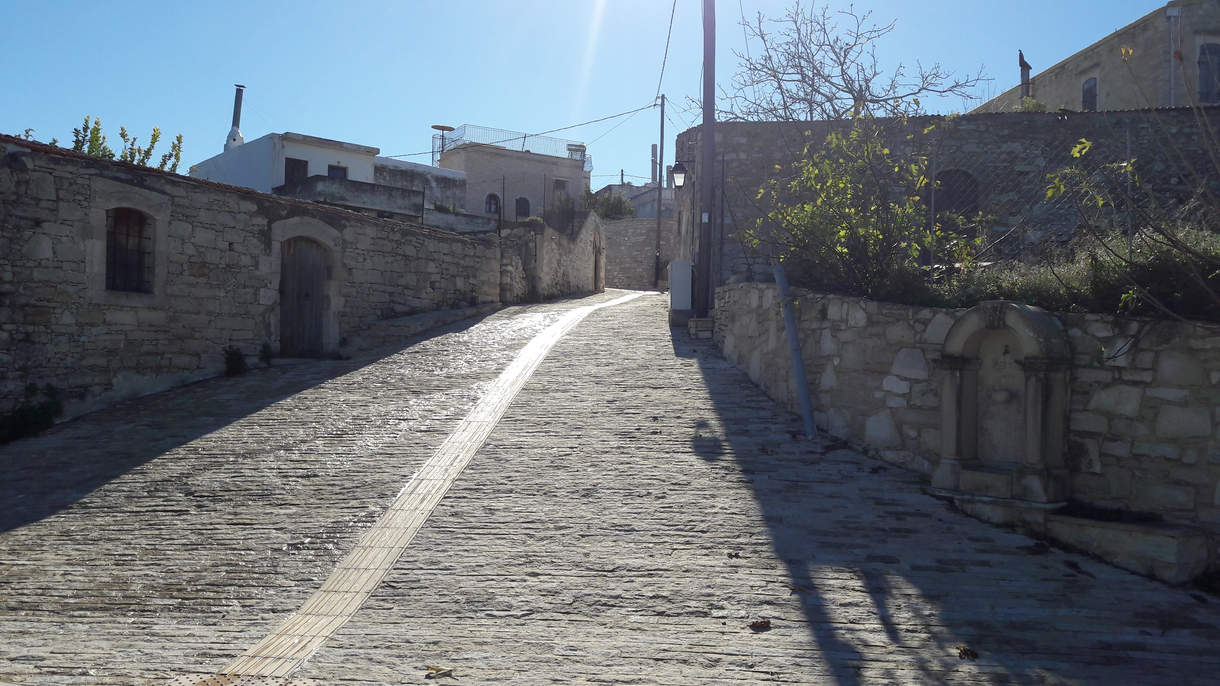 Καλαμάς, είσοδος